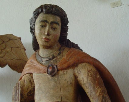 MM.044 - São Gabriel